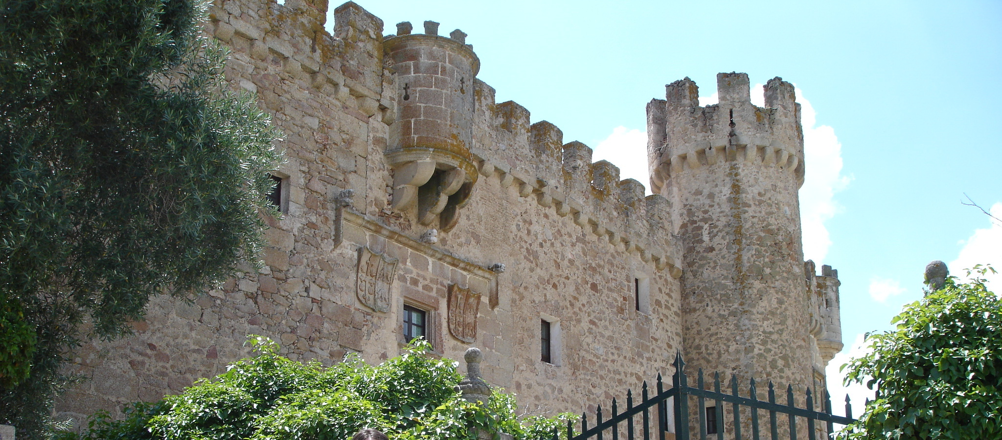 Castillo de las Arguijuelas de Abajo